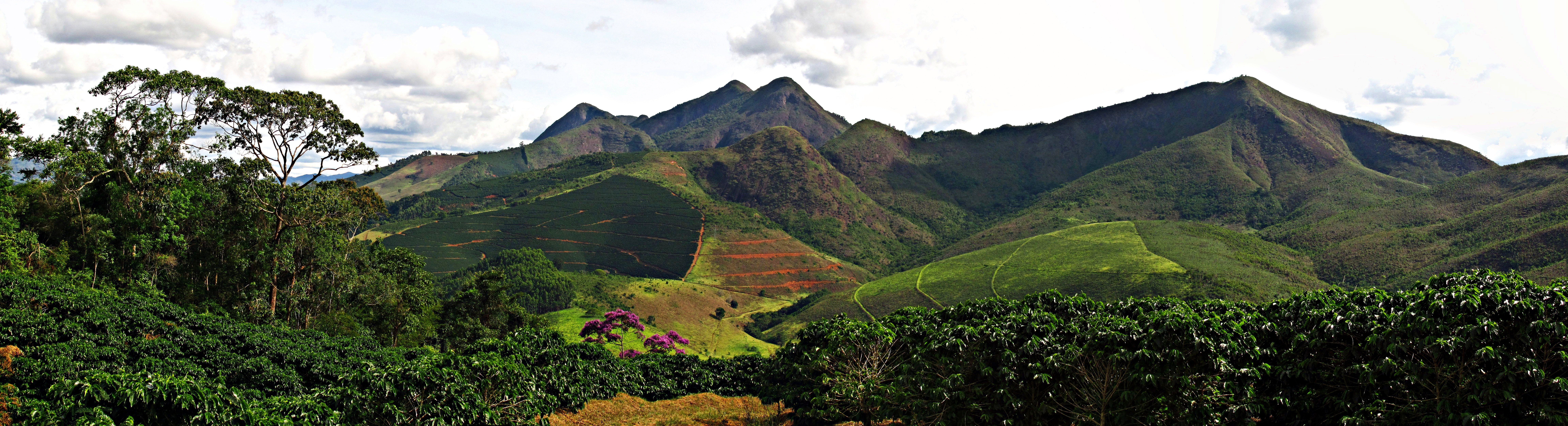 Vista para as serras de Manhuaçu no alto de um cafezal na região da Ponte do Evaristo e Cachoeira Sette.